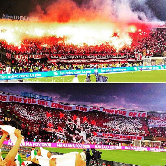 La hinchada Santafereña con bengalas y un tifo alentando al equipo